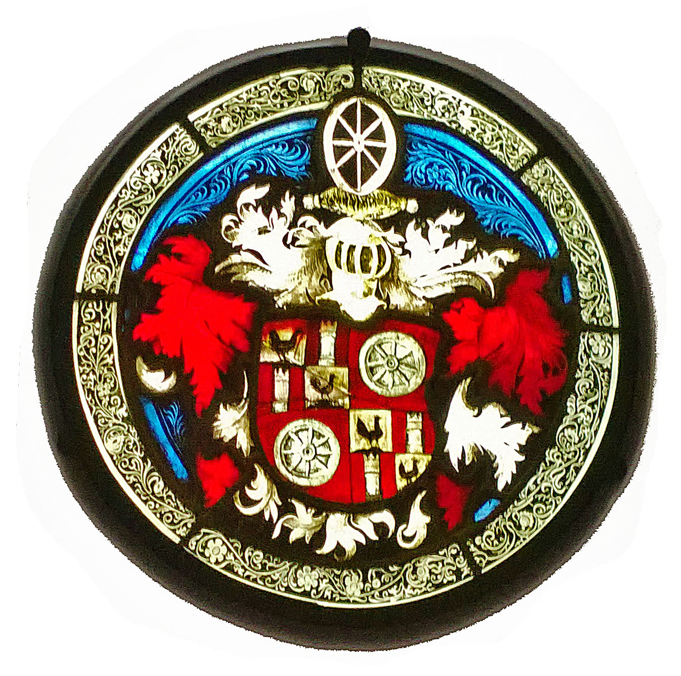 Wappen des Mainzer Erzbischofs Berthold von Henneberg, bemaltes und verbleites Hüttenglas vom Mittelrhein, um 1485; heute im Darmstädter Landesmuseum